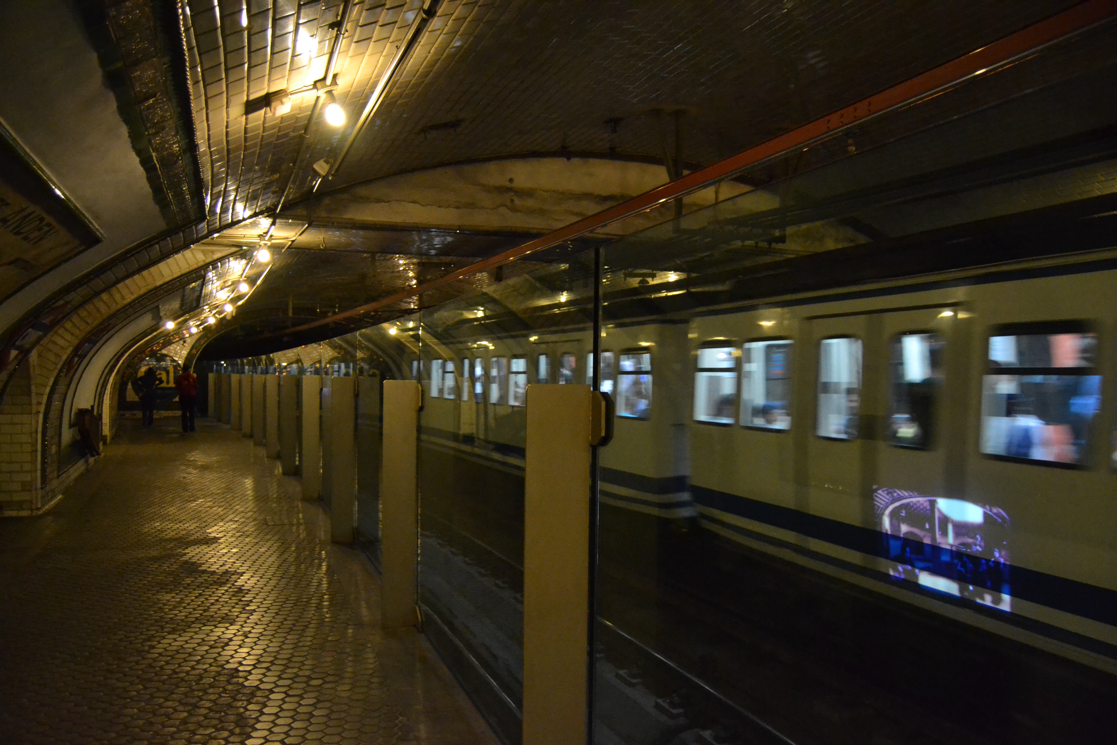 Estación de Chamberí, Andén 0